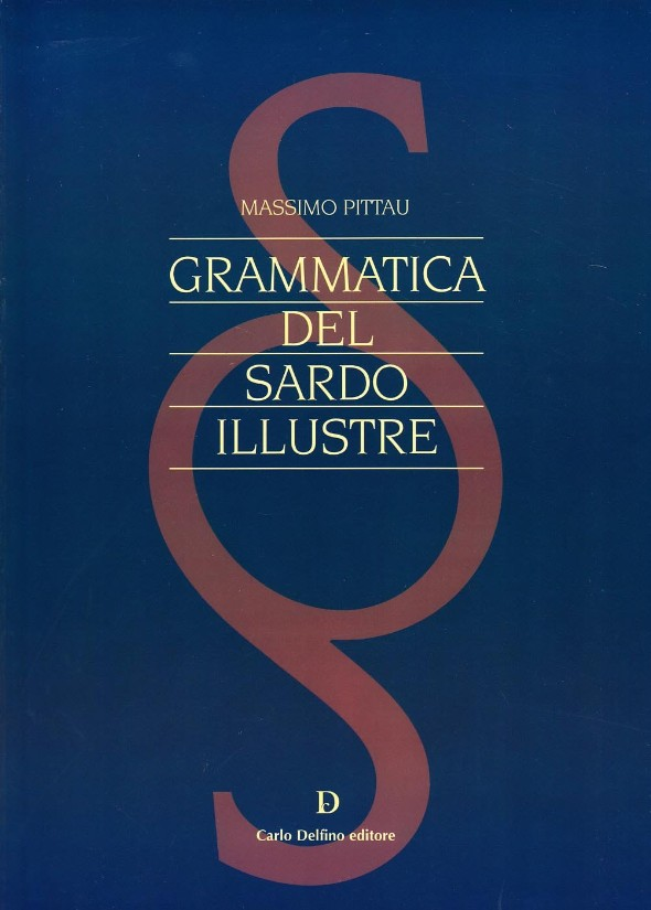 Massimo Pittau: Grammatica del sardo illustre. Carlo Delfino, Sassari 2005.